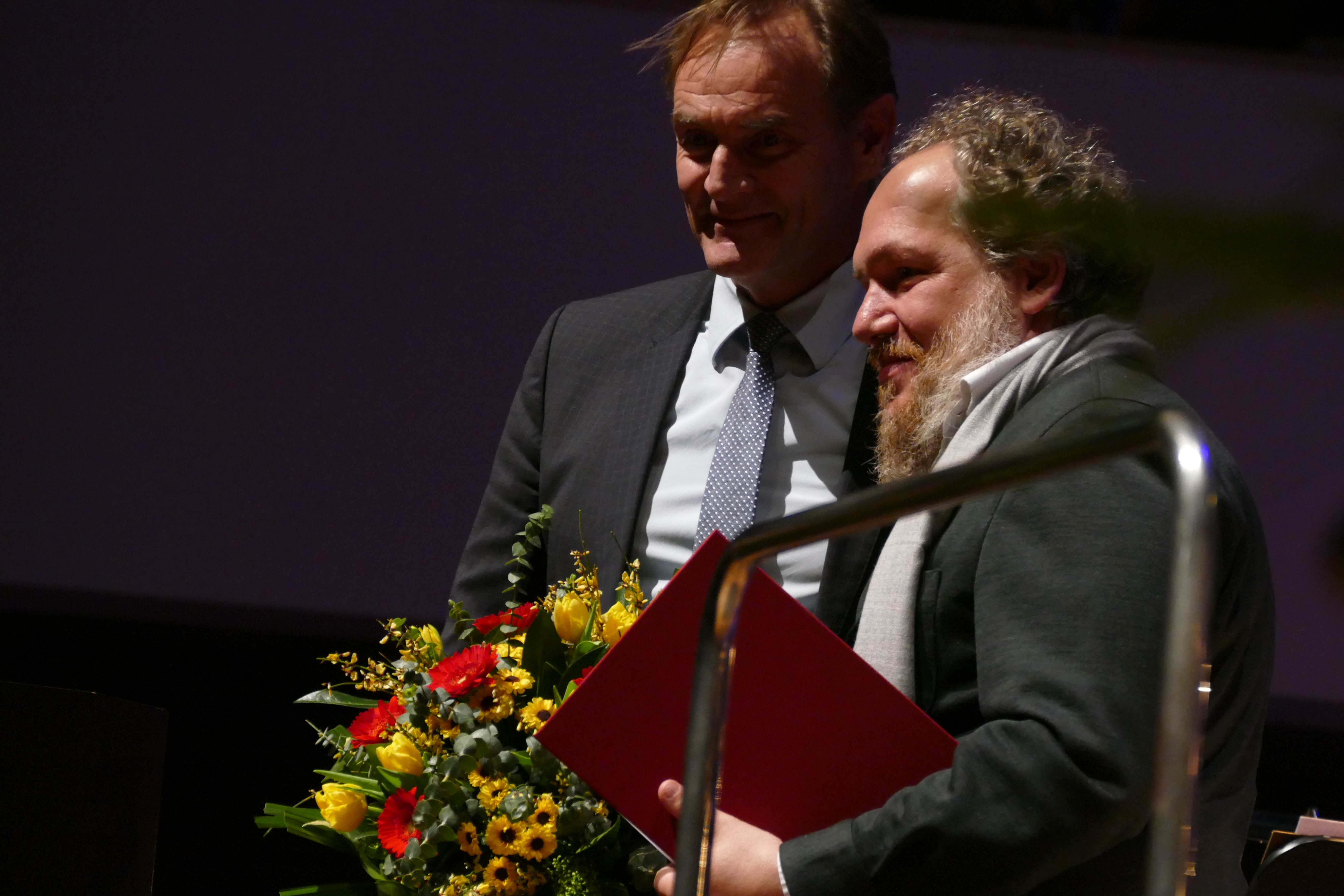 Leipzigs Oberbürgermeister Burkhard Jung überreicht Marhias Énard den Leipziger Buchpreis zur Europäischen Verständigung